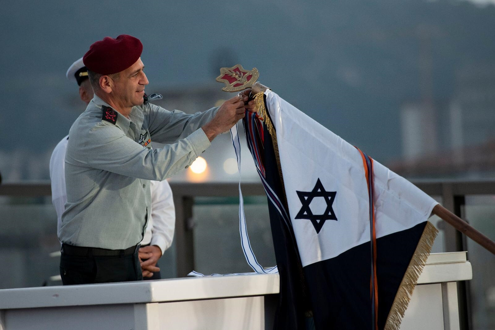 הרמטכ"ל רב אלוף אביב כוכבי מוסיף את סרט ההערכה לדגל שייטת ספינות הטילים יולי 201